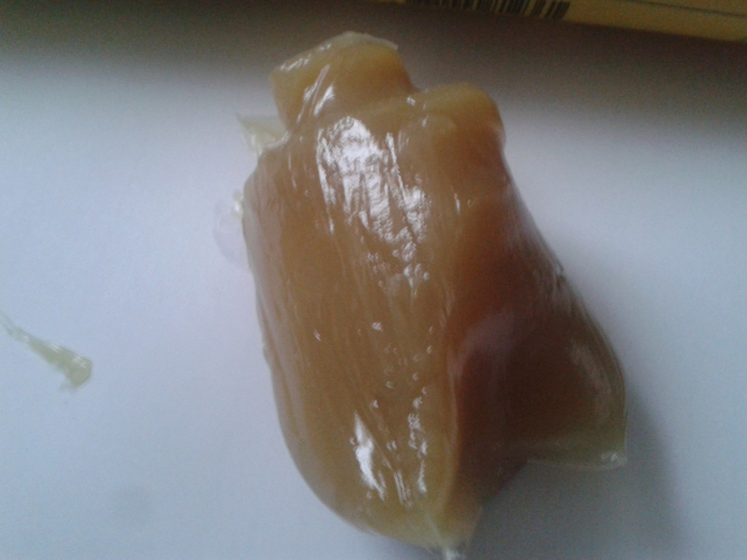 Mast olmaplex ep-2 je litijeva kompleksna ep mast z izjemnimi lastnostmi odpornosti proti visoki temperaturi in mehanskim obremenitvam. Uporabna za mazanje vseh vrst ležajev v širokem območju temperature in obremenitev.